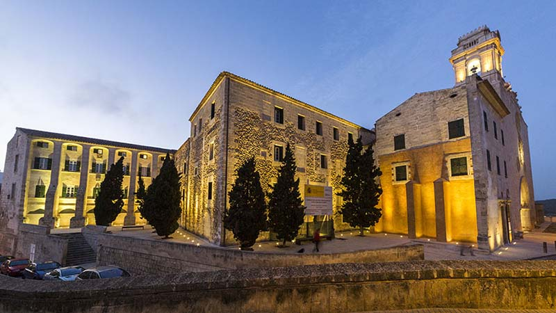 Museu de Menorca